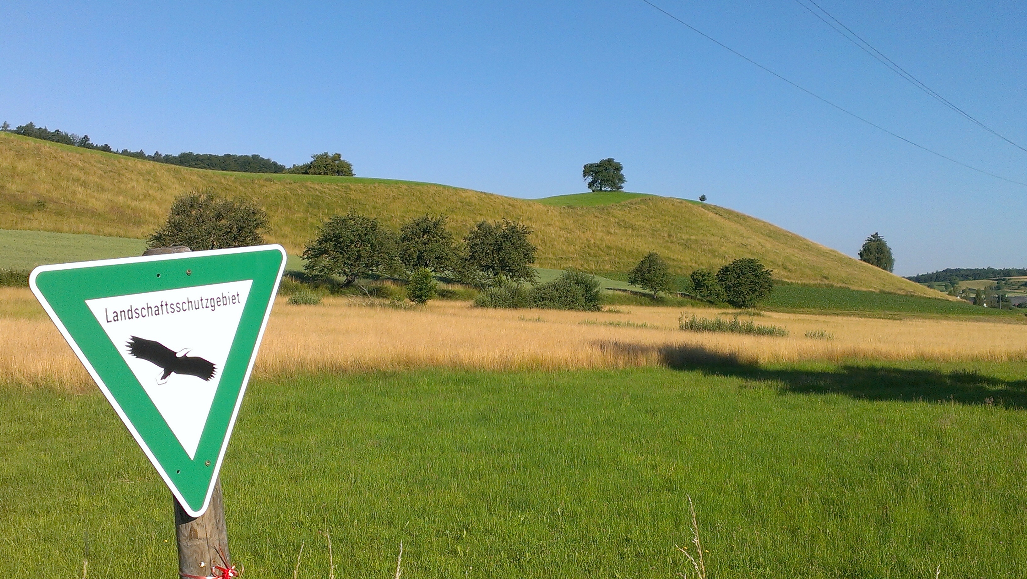 Deutschland - Baden-Württemberg - Bodenseekreis - Überlingen: Landschaftsschutzgebiet „Drumlin Biblis“